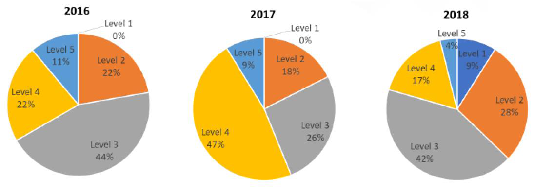 Répartition des incident par criticité